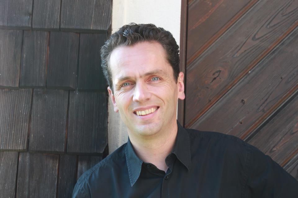 Der österreichischer Musiker, Chorleiter und Musikpädagoge Helmut Schaumberger